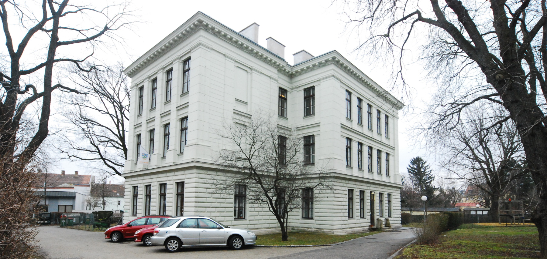 Bezirksmuseum Liesing in der Canavesestraße in Wien-Liesing